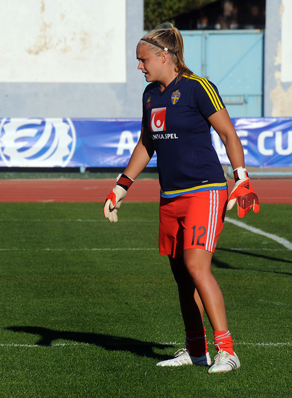 a_13_6568